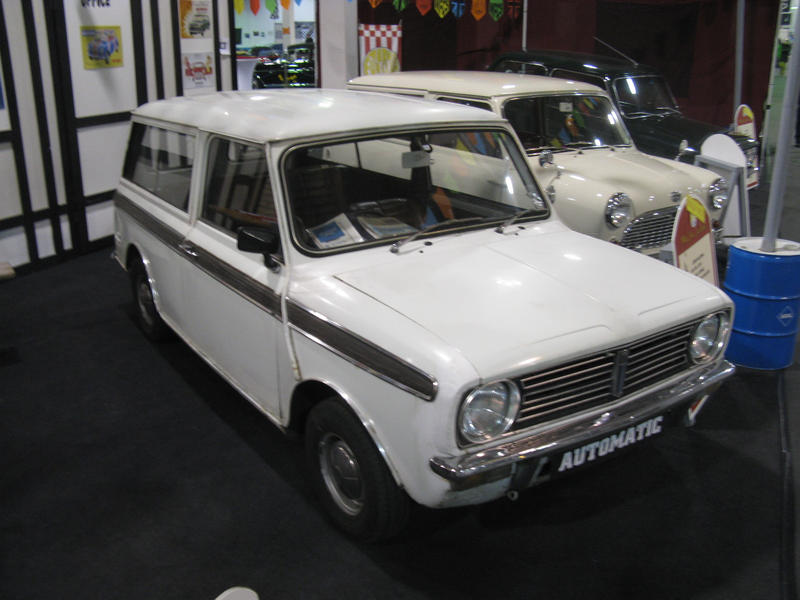 Mini Clubman Estate